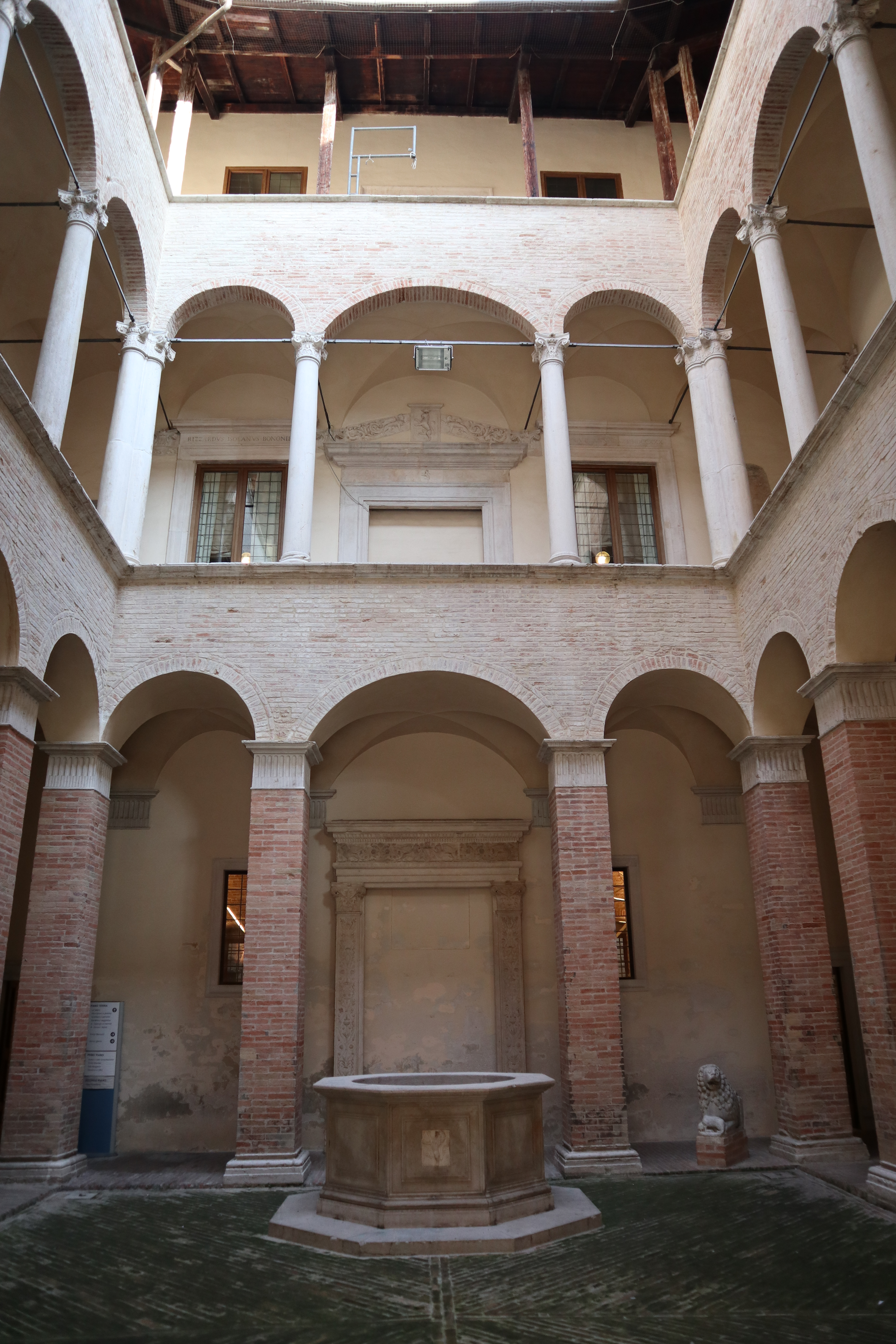 Cortile di Andrea Sansovino